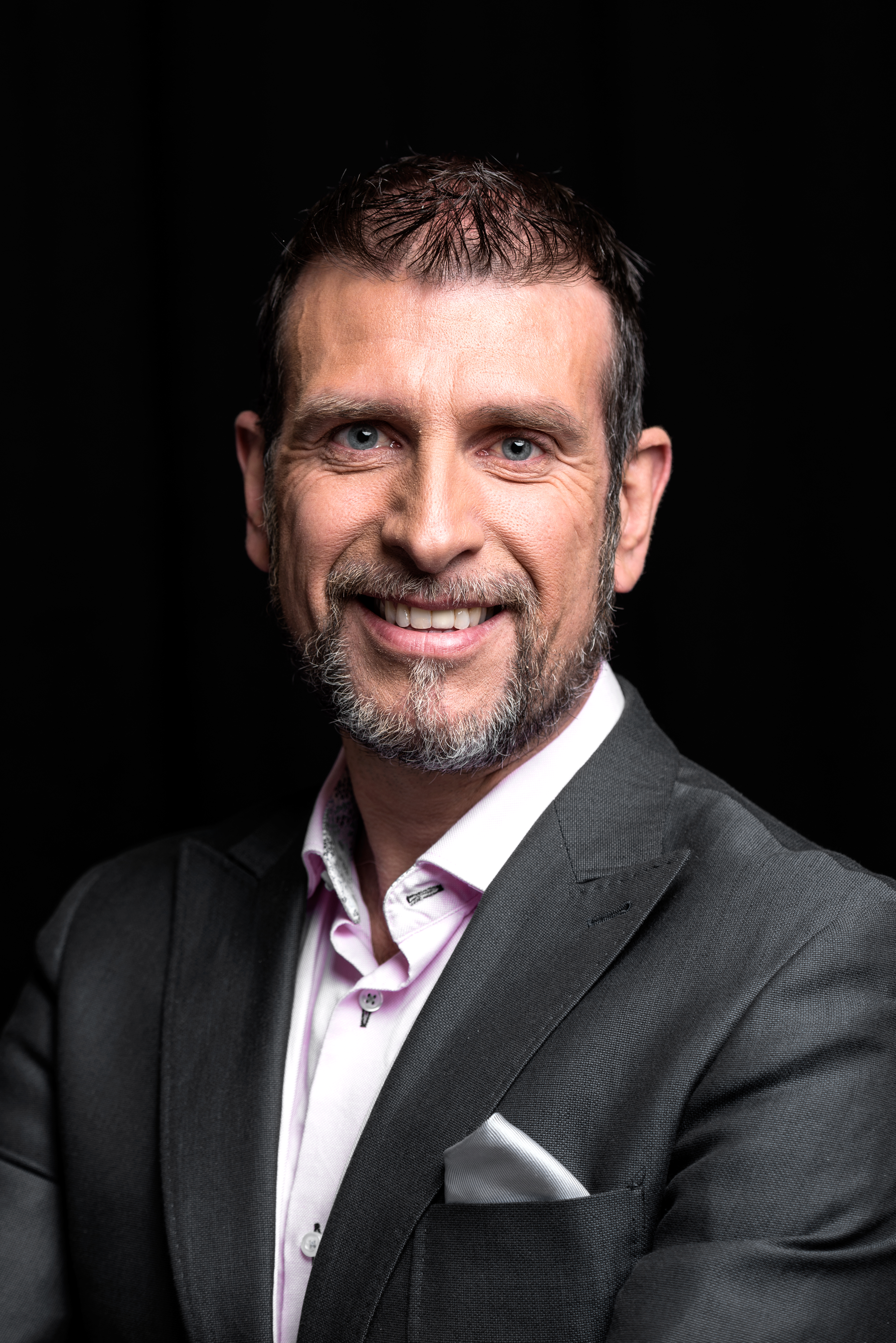 Eurosports cykel- och längdåkningskommentator Roberto Vacchi.